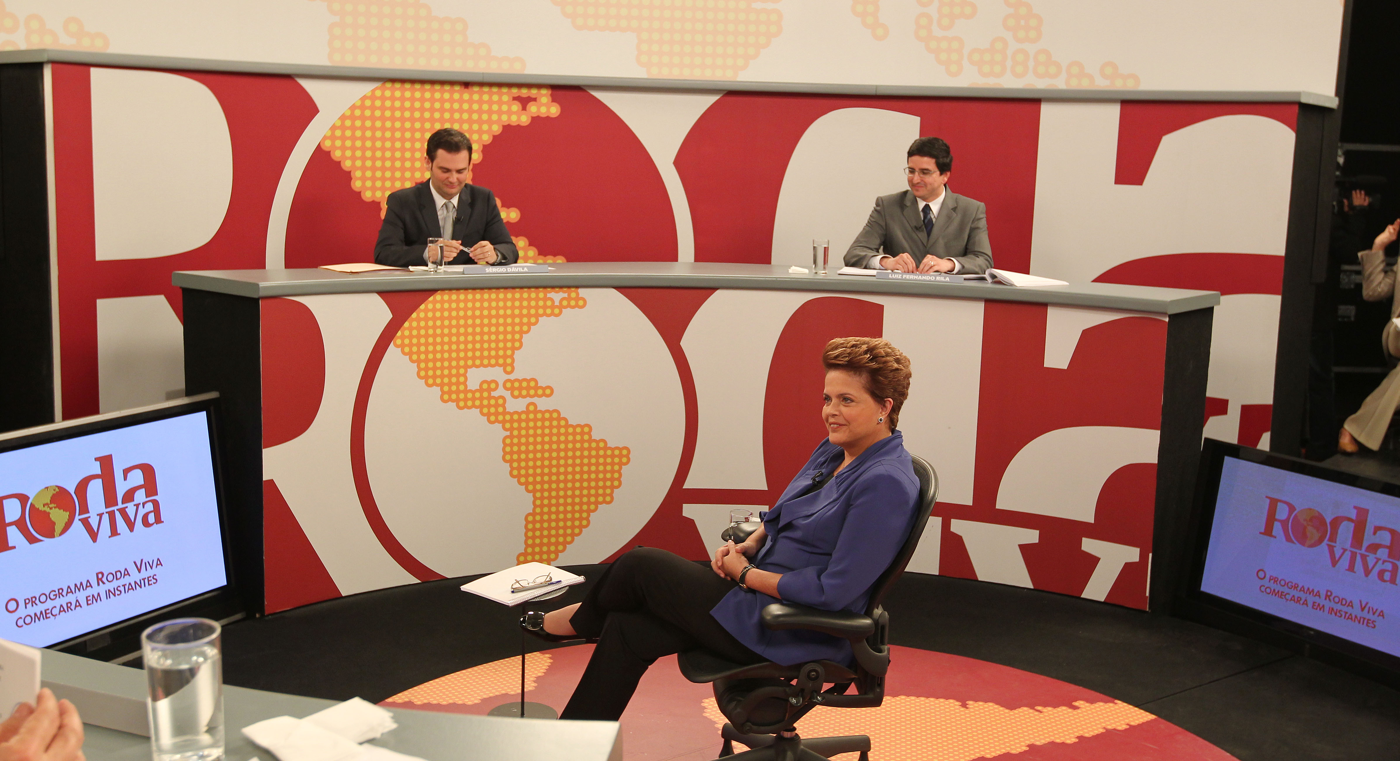 28/06/2010. São Paulo - SP. Entrevista ao Programa Roda Viva. Foto: Roberto Stuckert Filho.